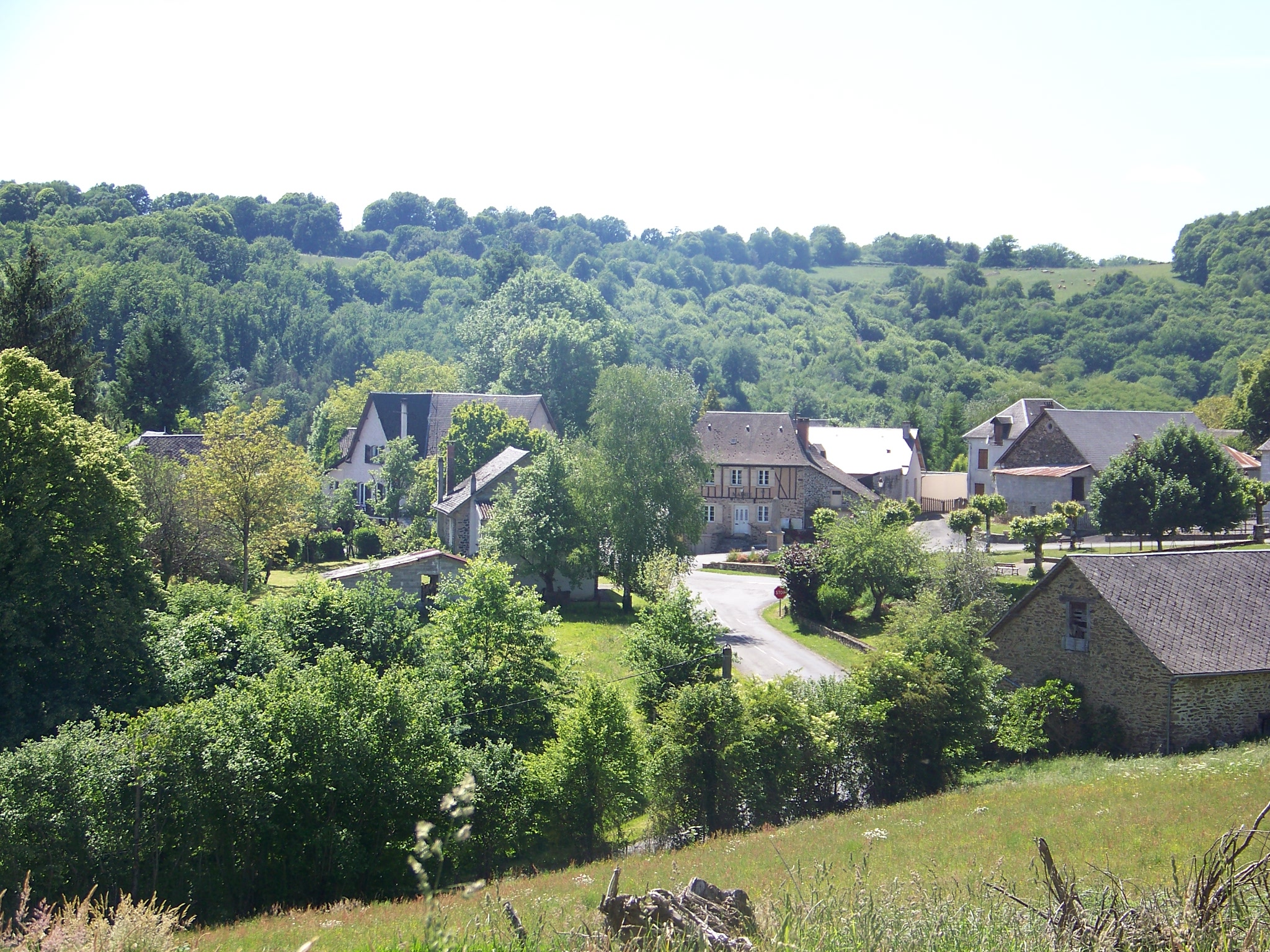 Vue du bourg d'Espartignac